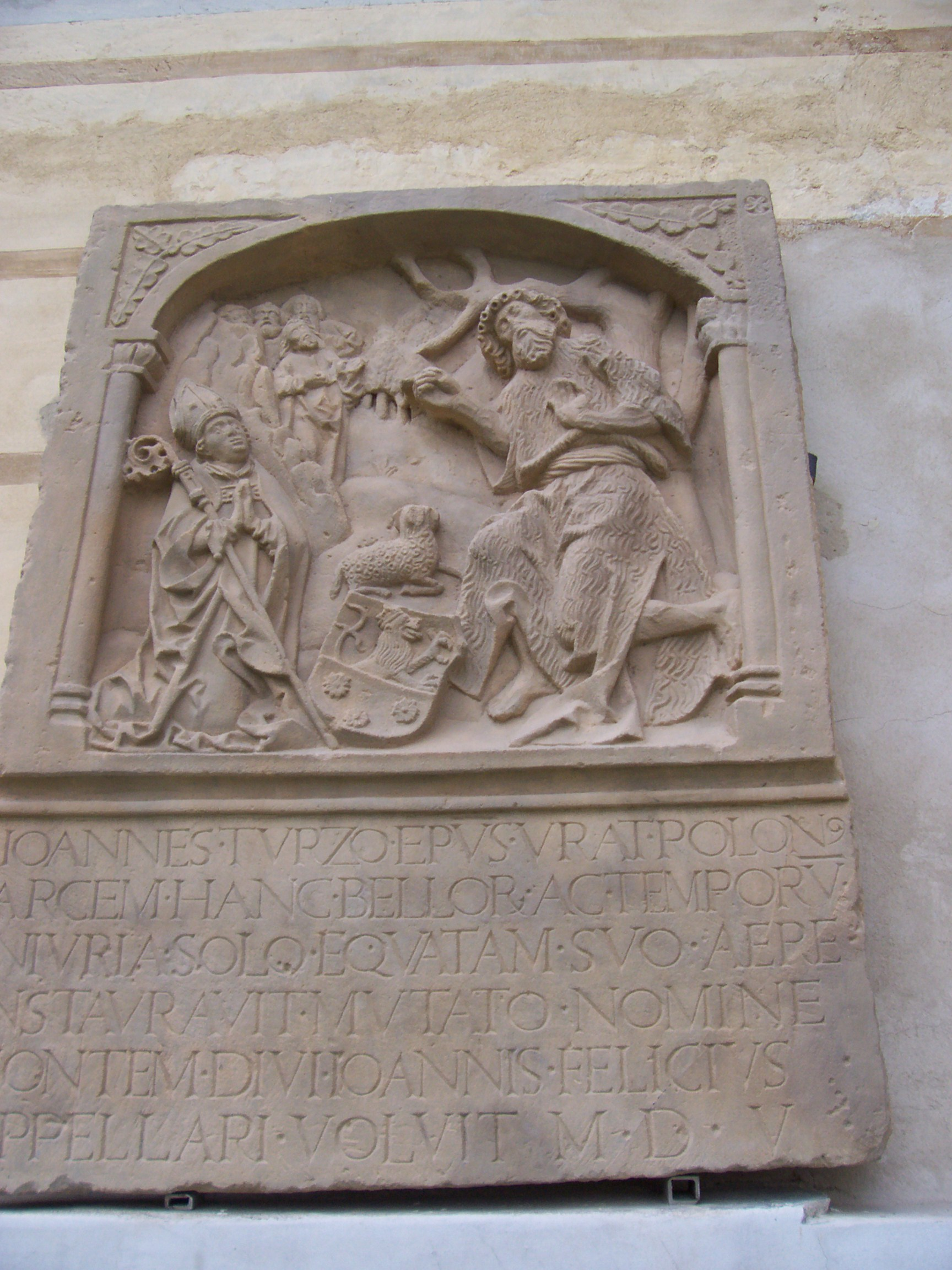 Tablica fundacyjna biskupa wrocławskiego Jana V Thurzo na zamku Jánský vrvh w Javorniku koło Jesienika